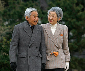 Ակիխիտոն կնոջ հետ միասին